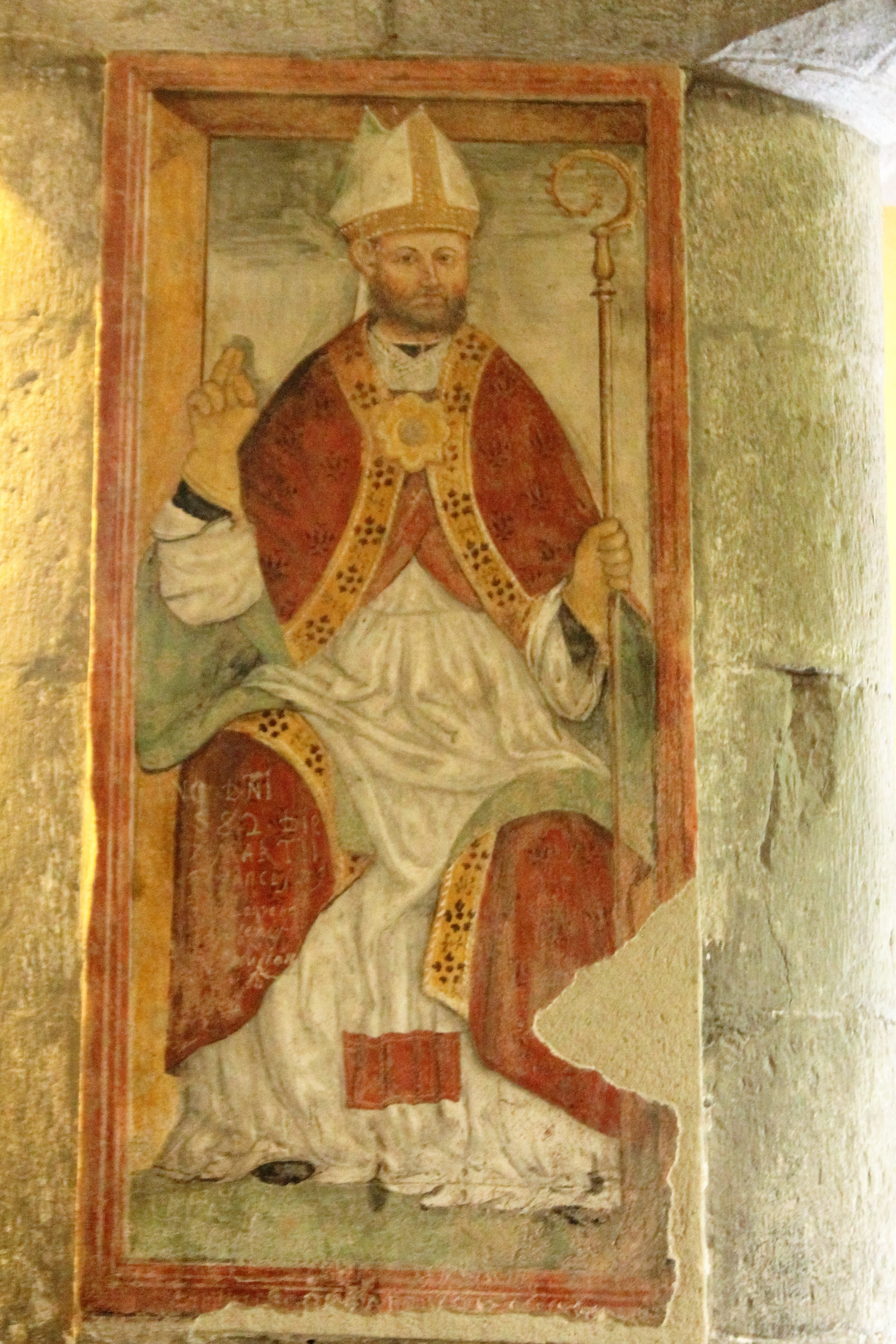 Affresco di San Gottardo nella chiesa parrocchiale di San Giacomo e Vincenzo di Gromo